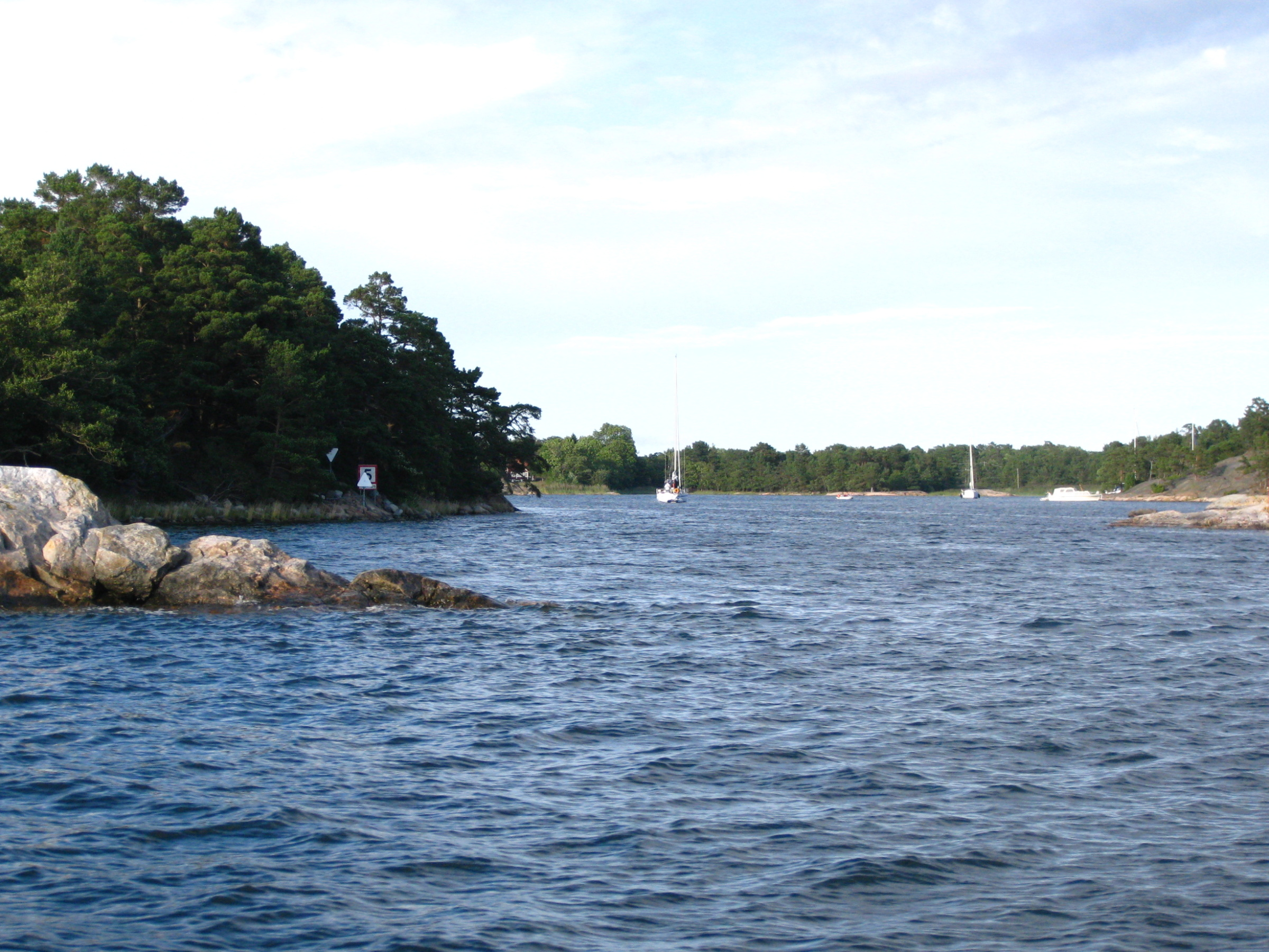 Inloppet till naturhamnen på Jungfruskär är utmärkt med en enslinje (vänster i bild).